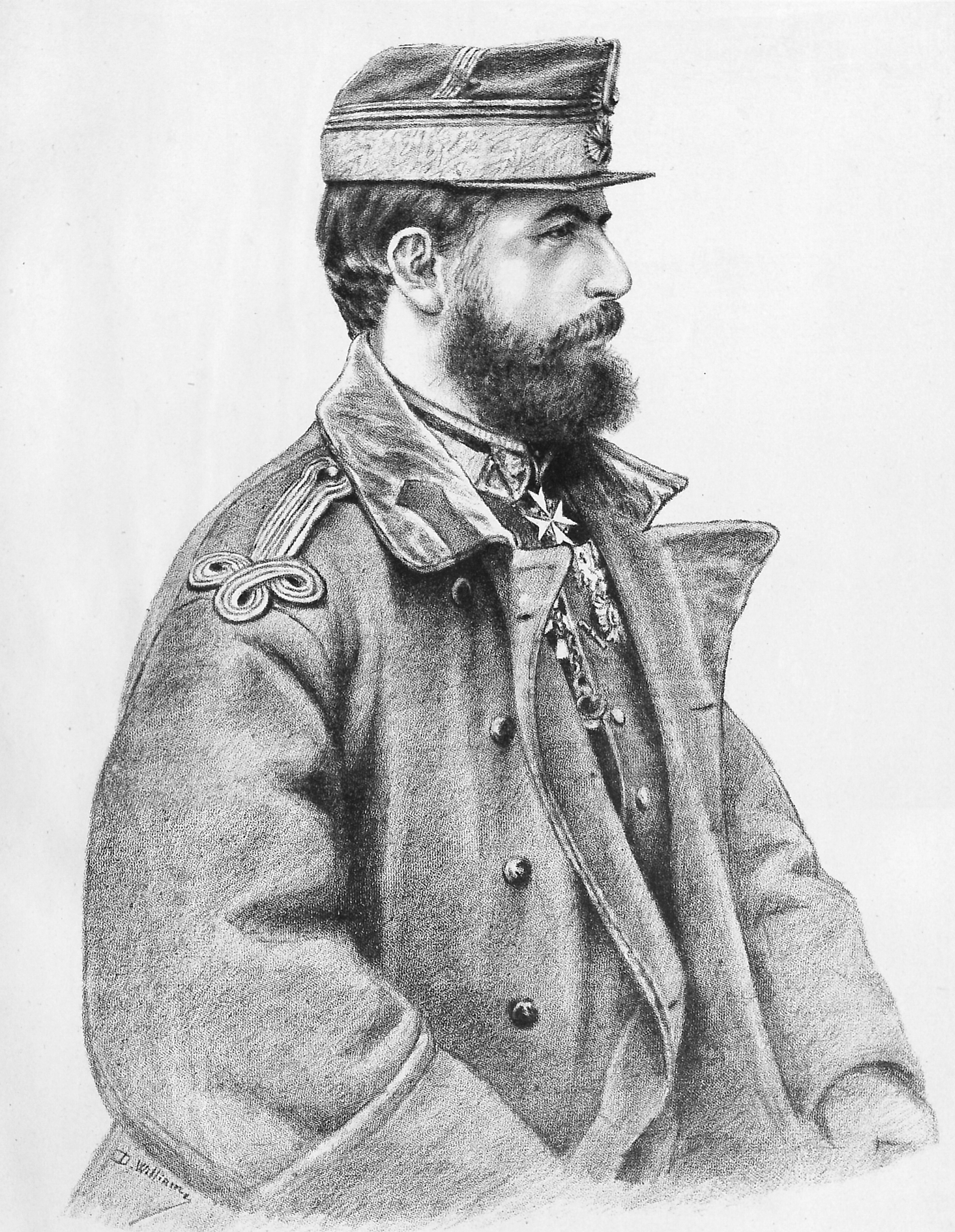 Portraits contemporains avec autographes : Politique, armée, clergé, letters, théatres & arts dessines & lithographies par D. William Bukarest, 1881 Carol - S. M. le Roi